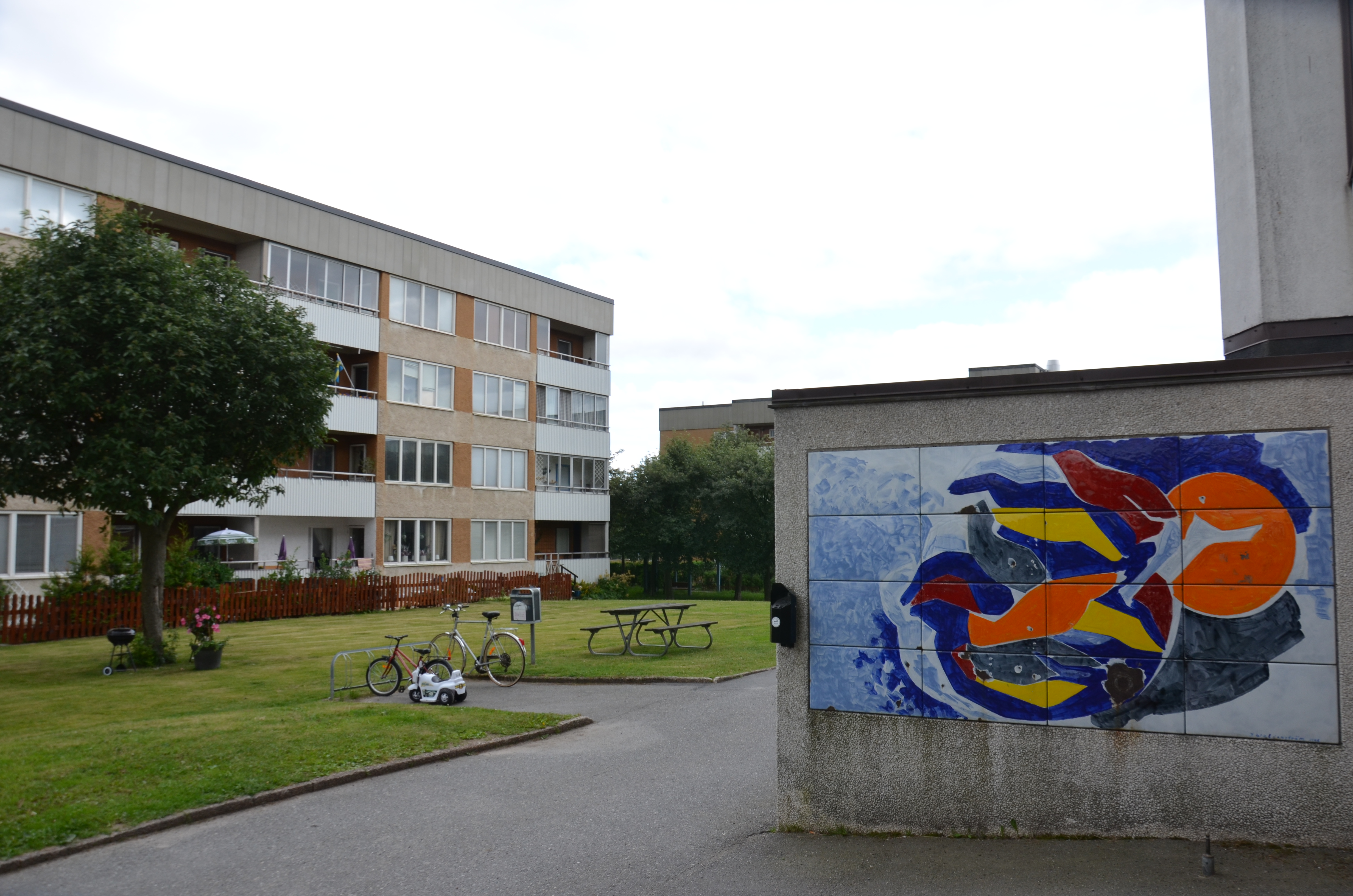 Hus i Östberga i Stockholm med målning Fåglar av Johan Waldenström